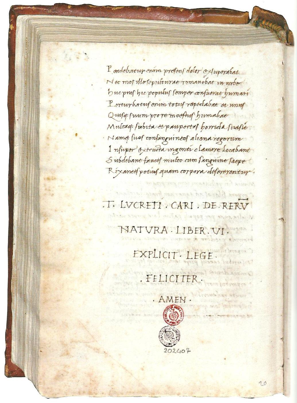 Ultima pagina della trascrizione del De rerum natura di Lucrezio da parte dell'umanista Niccolò Niccoli.